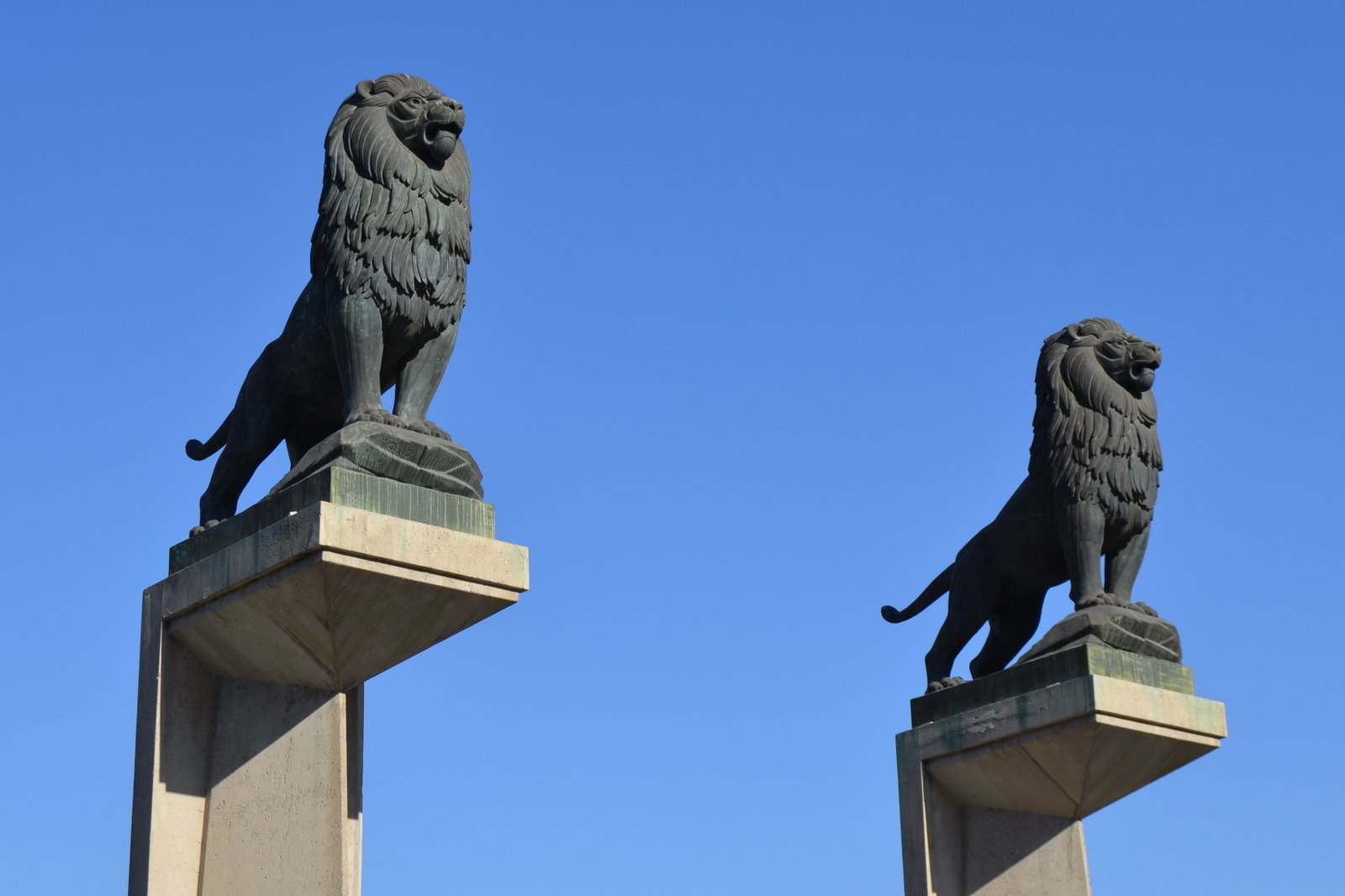 Leones guardando la entrada al Puente de Piedra